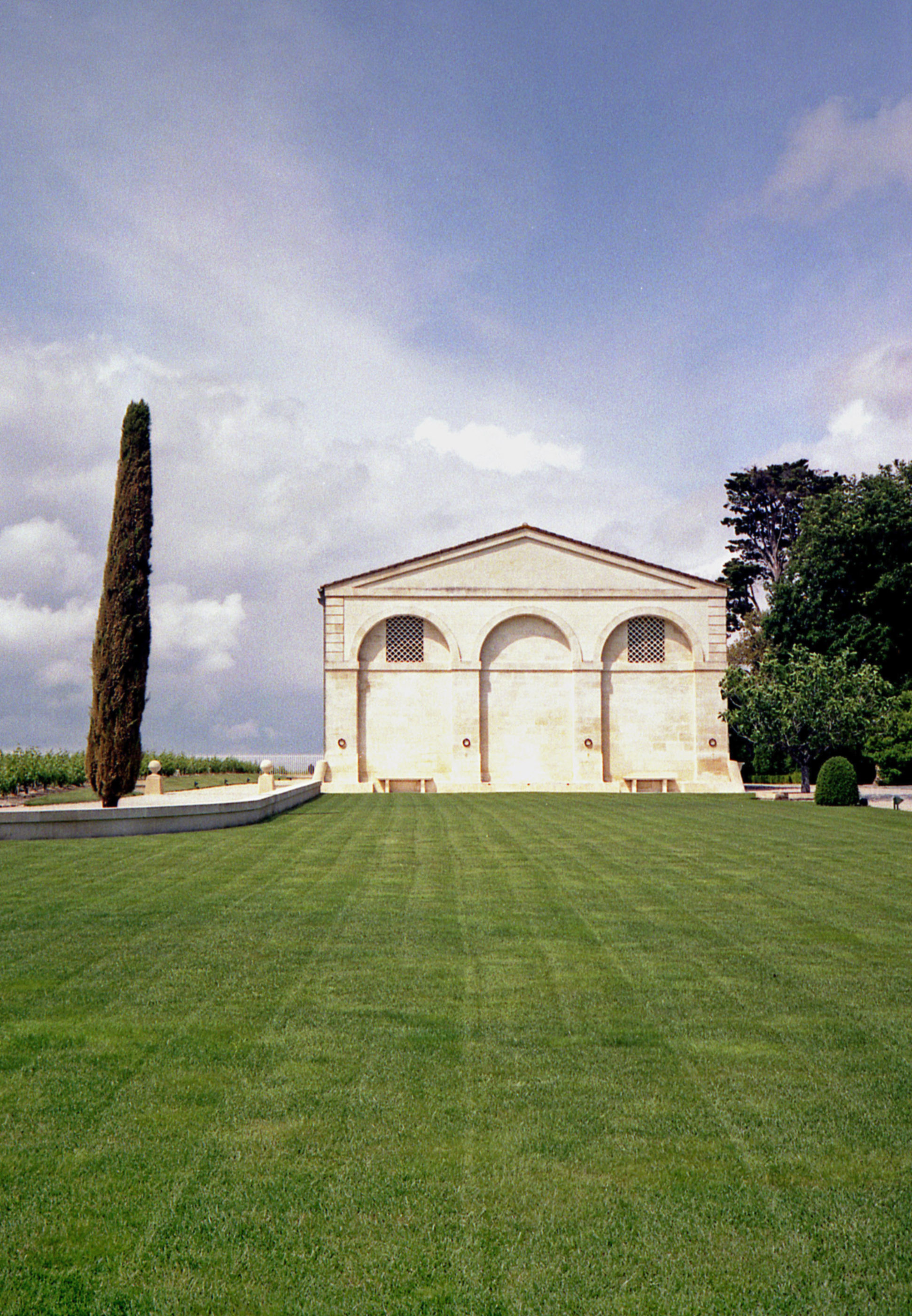 Château Mouton Rothschild - Bordeaux - Paulliac